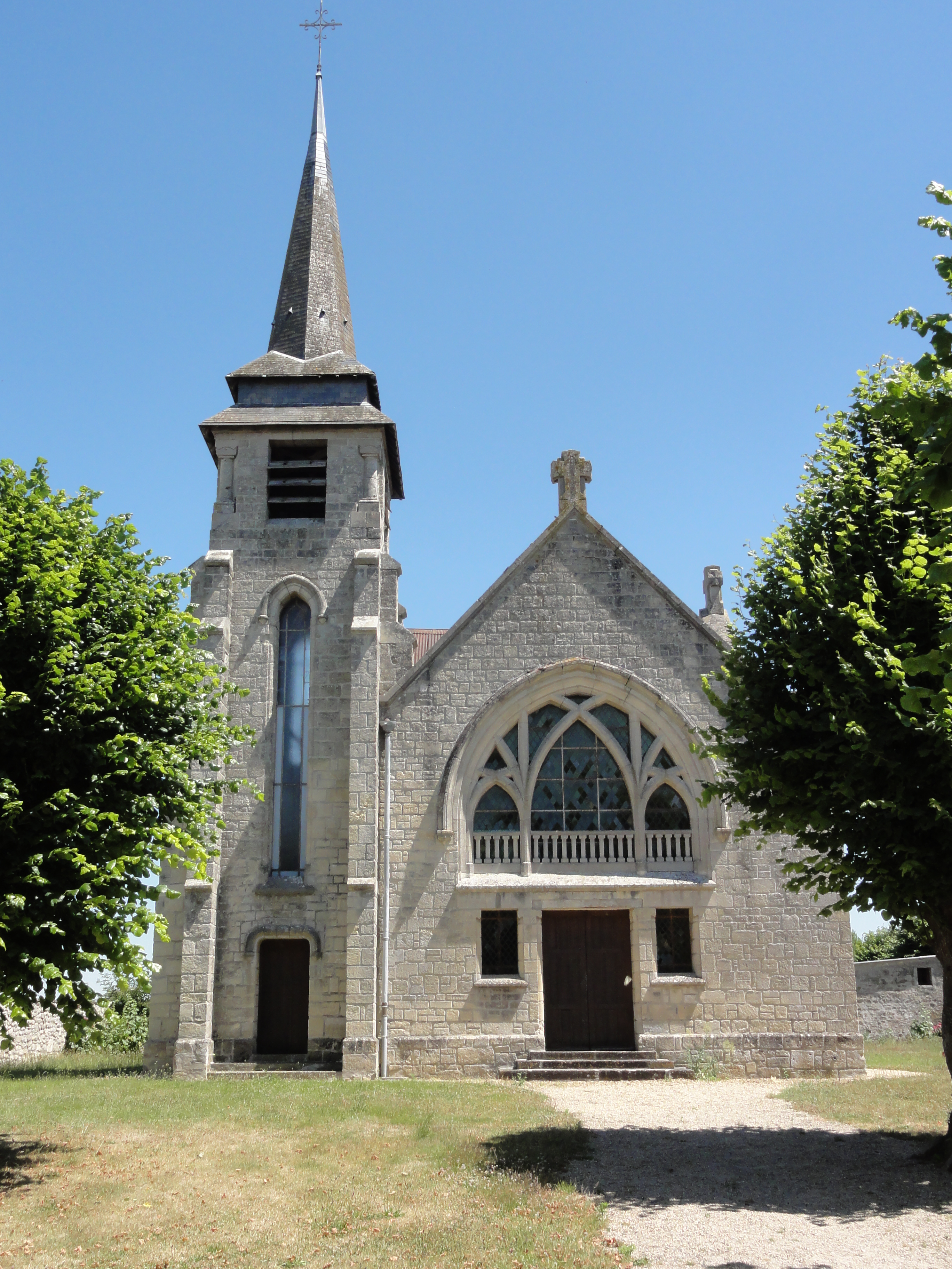 Villers-en-Prayères (Aisne) église